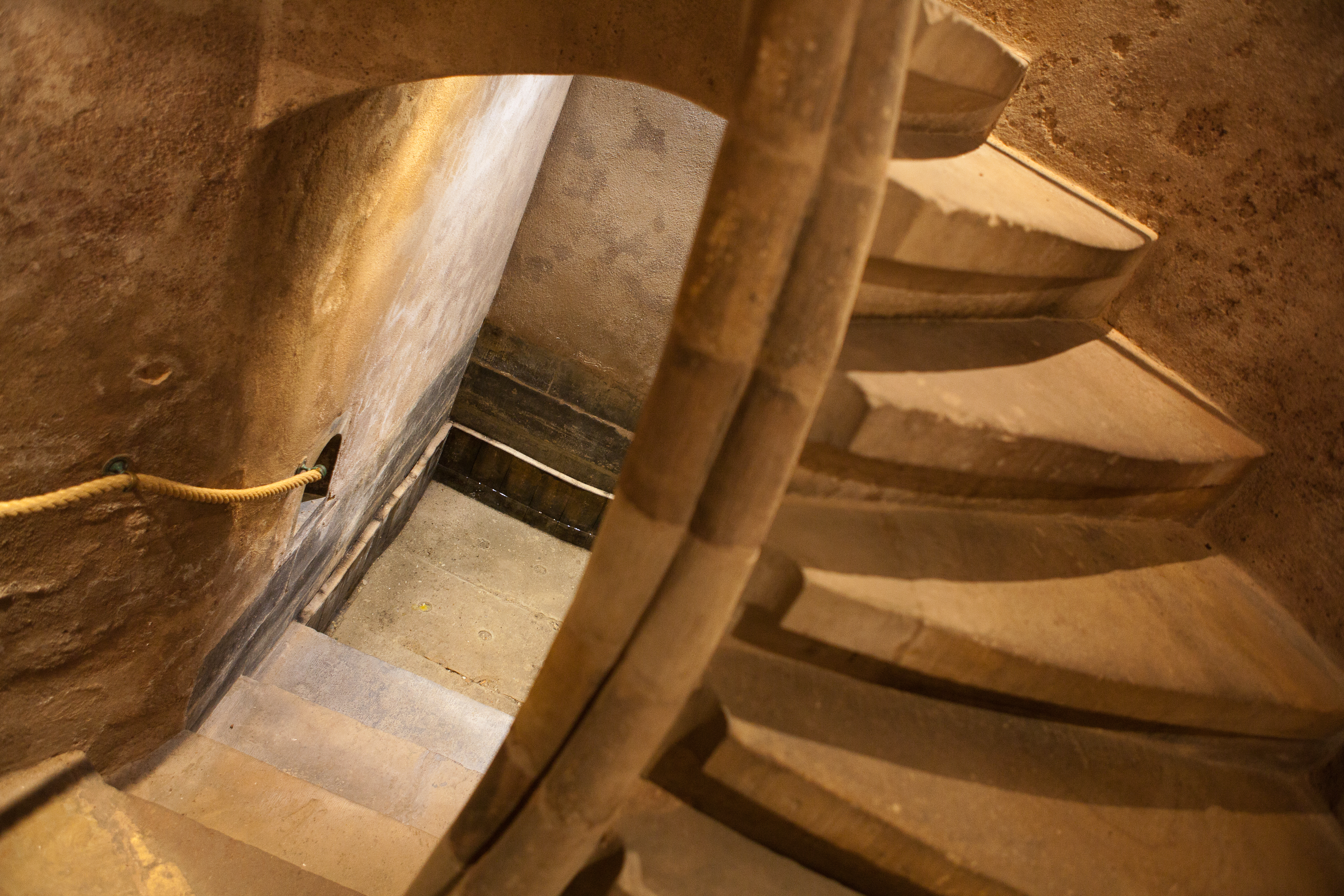 Miqvé de la Cour des Boecklin à Bischheim